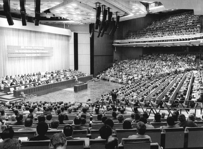 ADN-ZB Reiche-20.9.1979 Berlin: Bestarbeiterkonferenz-Etwa 3 000 verdiente Werktätige aus Betrieben und Einrichtungen der DDR-Hauptstadt zogen auf der 4. Berliner Konferenz der Bestarbeiter Bilanz im Wettbewerb "Kurs DDR 30"."